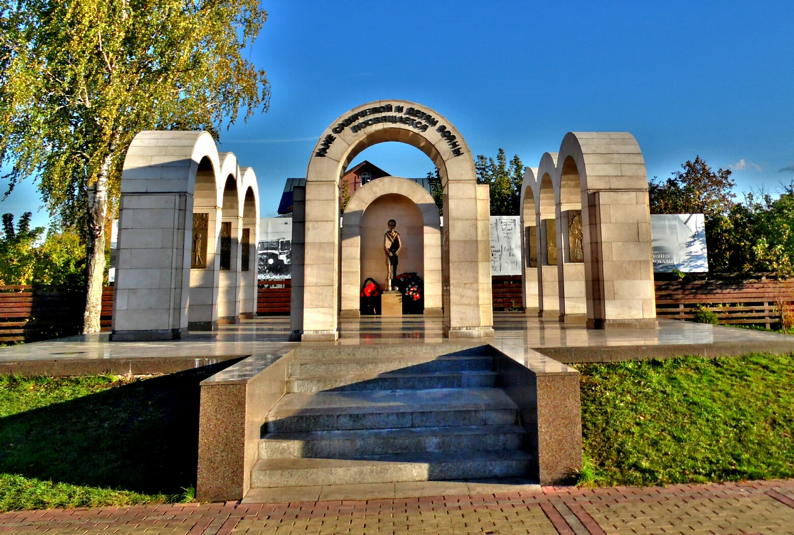 Был открыт 7 мая 2010 года. Авторы скульпторы Т. Холуёв и А. Холуёва.